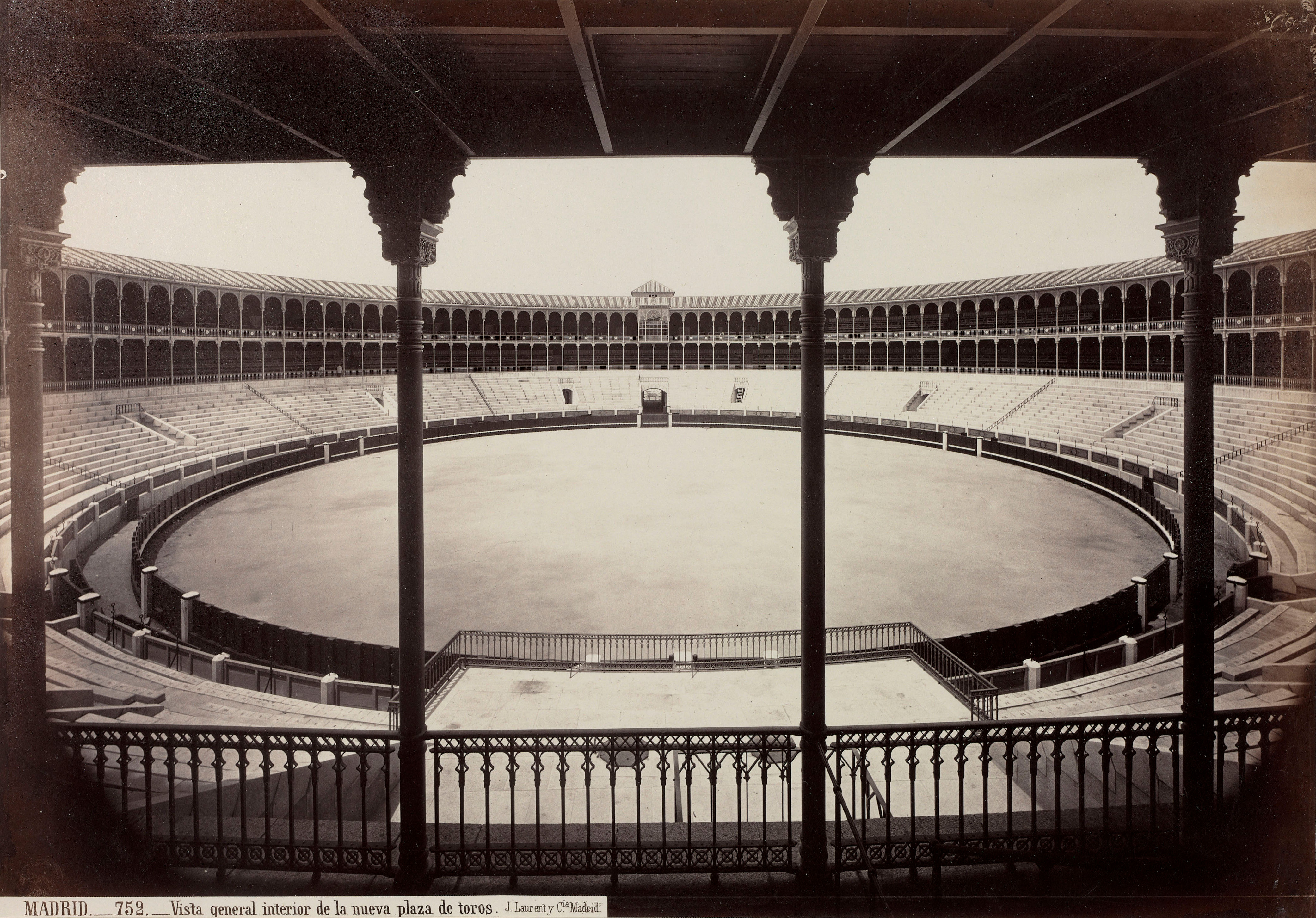 Juan Laurent, J. (1816-1886), Madrid, vista general interior de la nueva plaza de toros, 1874. Fotografía en papel albúmina; 269 x 384 mm. Leyenda en la esquina inferior izquierda: "MADRID.-752.-Vista general interior de la nueva plaza de toros. J. Laurent. y Cia. Madrid"